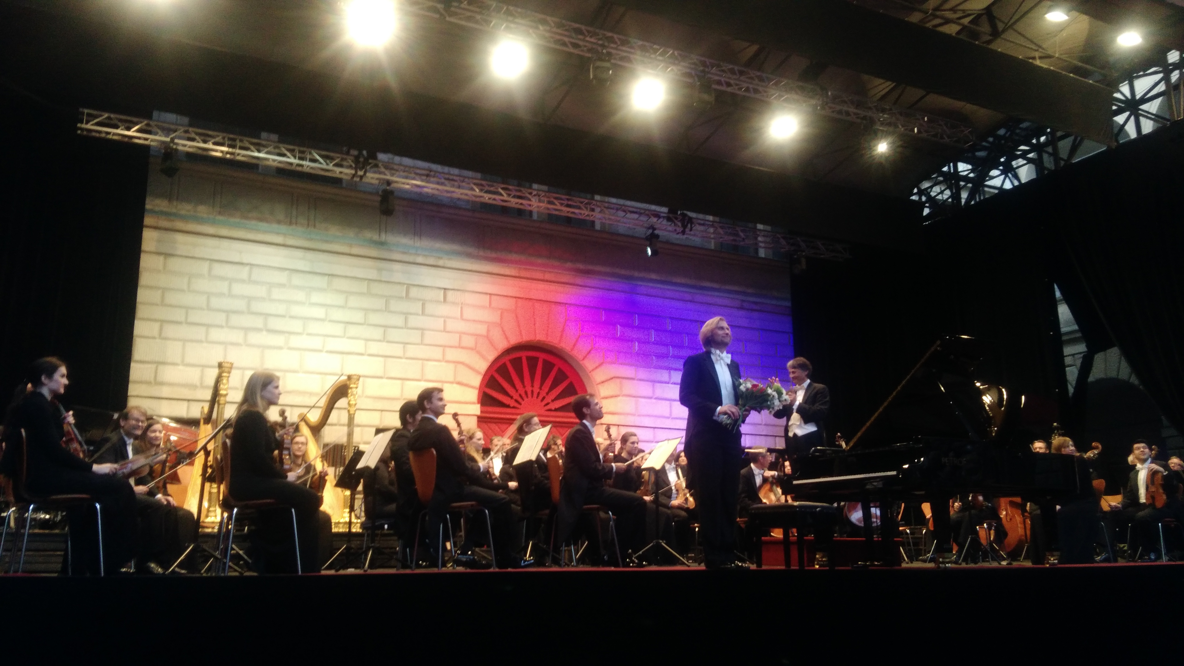 Smetanova Litomyšl 2018. Litomyšl, Česká republika.